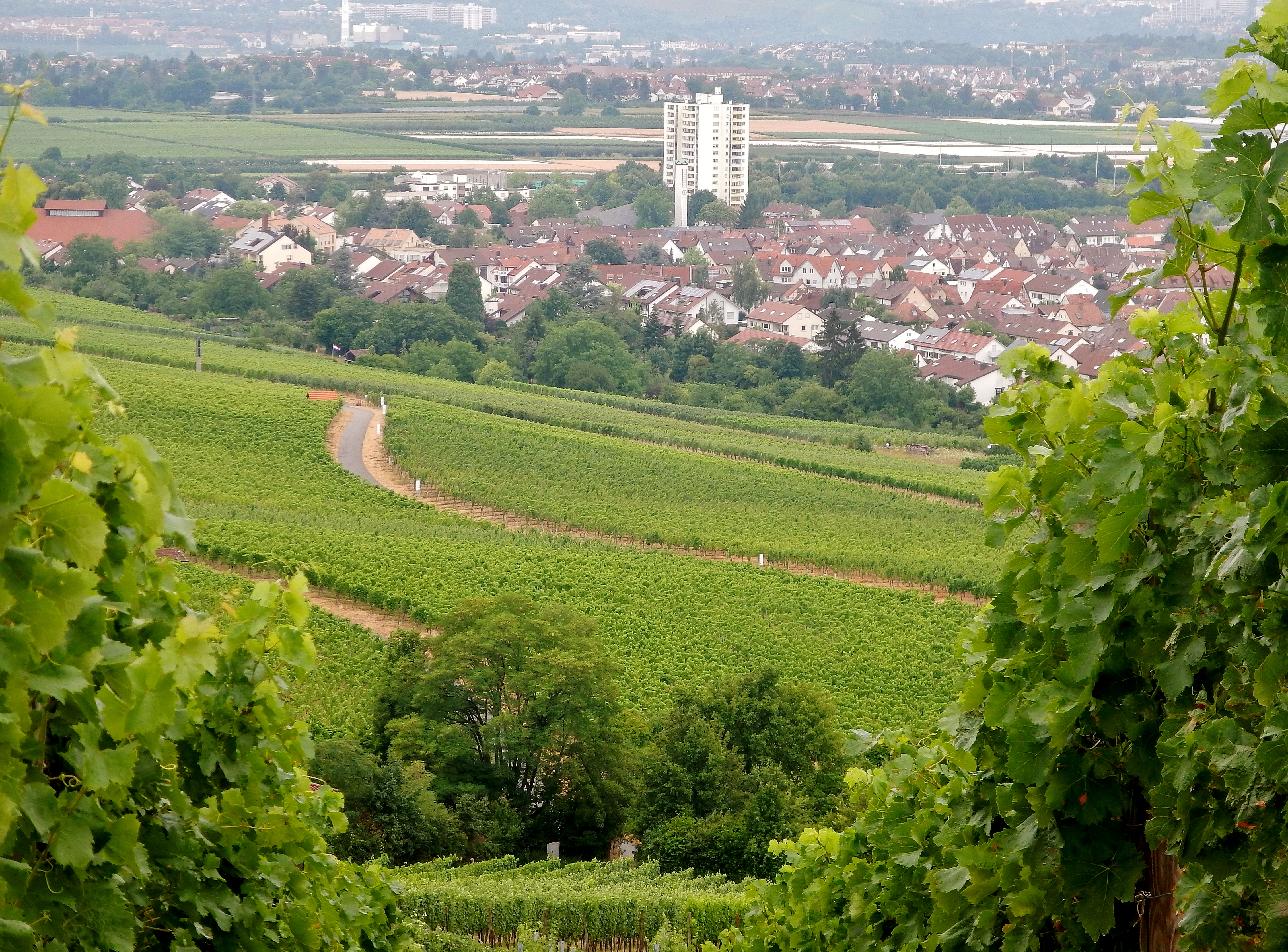 Blick Richtung Fellbach